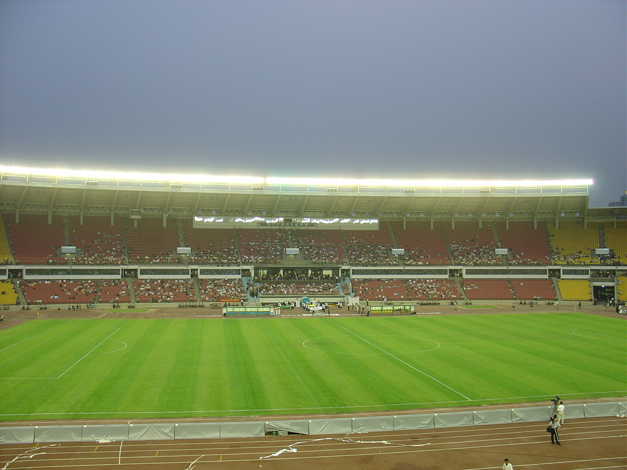 Workers' Stadium internal field